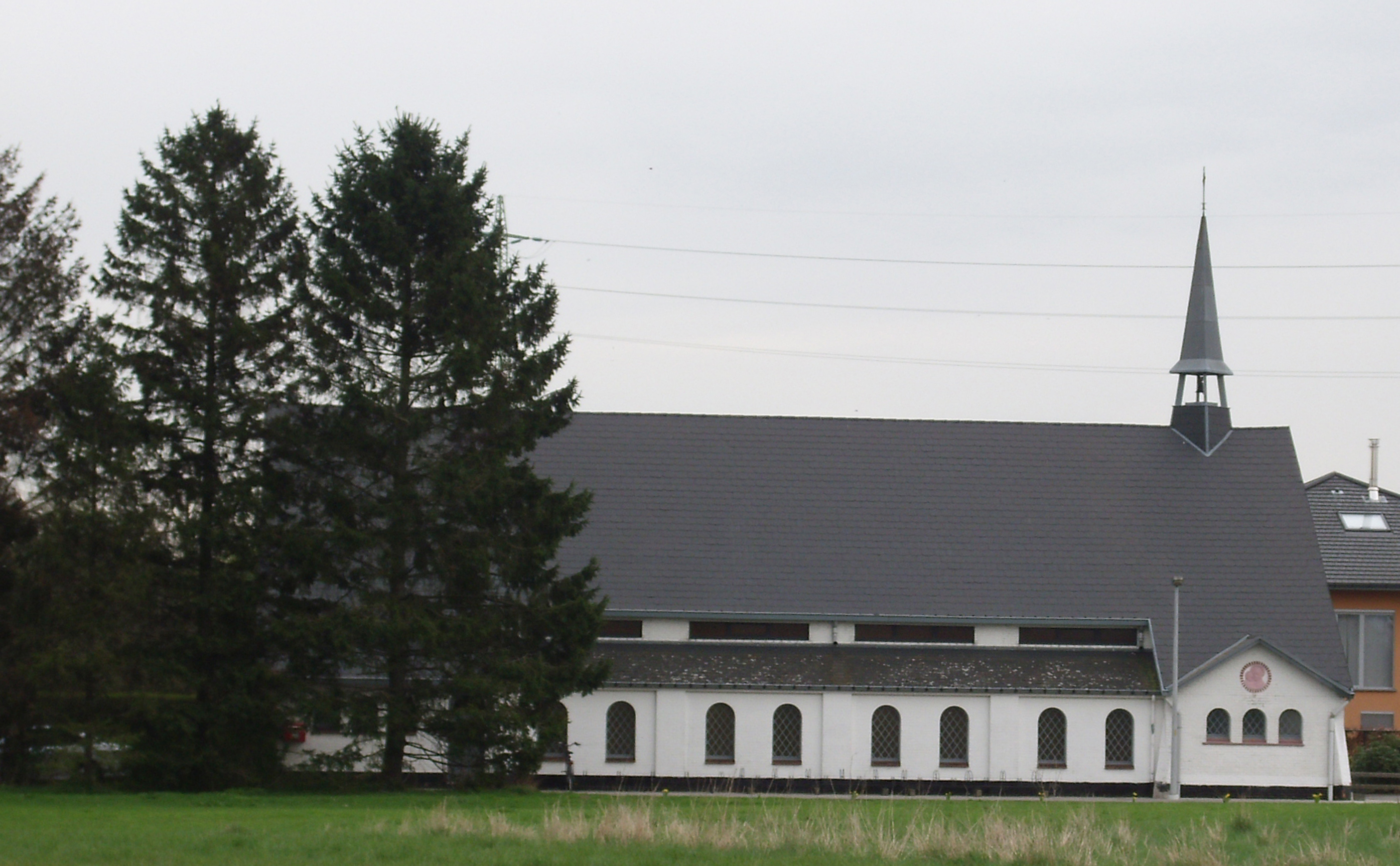 Parochiekerk Briel - grondgebied Buggenhout en Baasrode (Dendermonde) - Oost-Vlaanderen - Vlaanderen - België